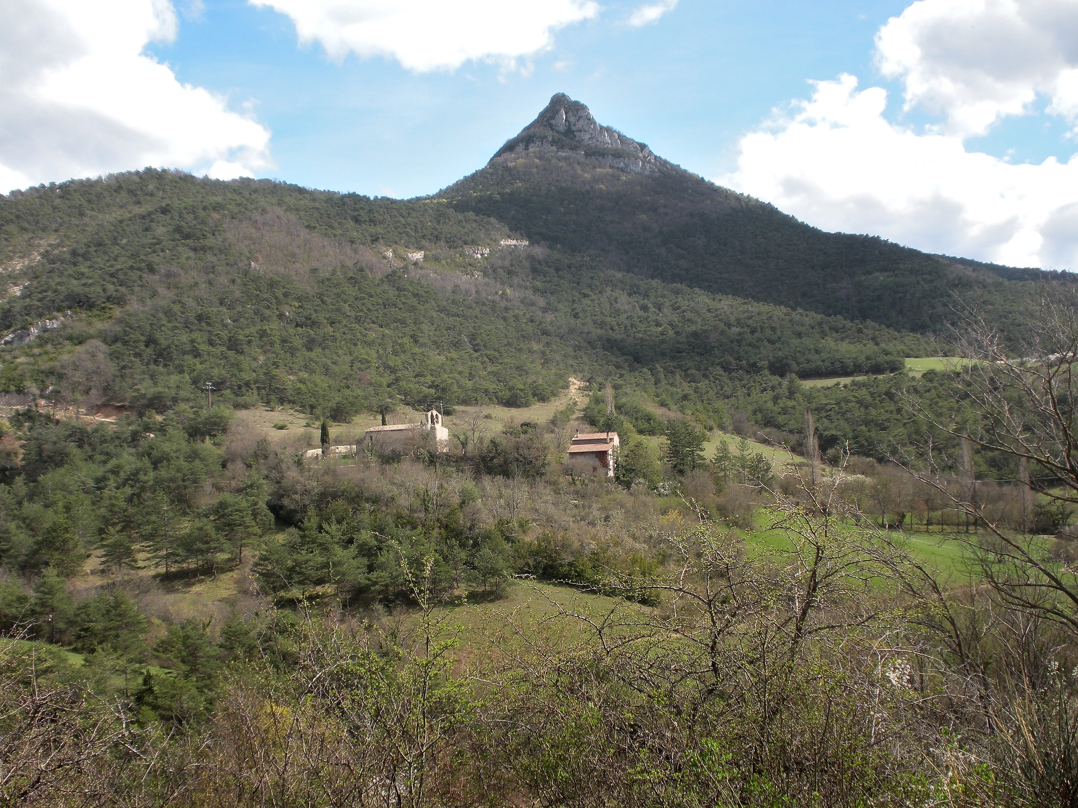 veronne le haut